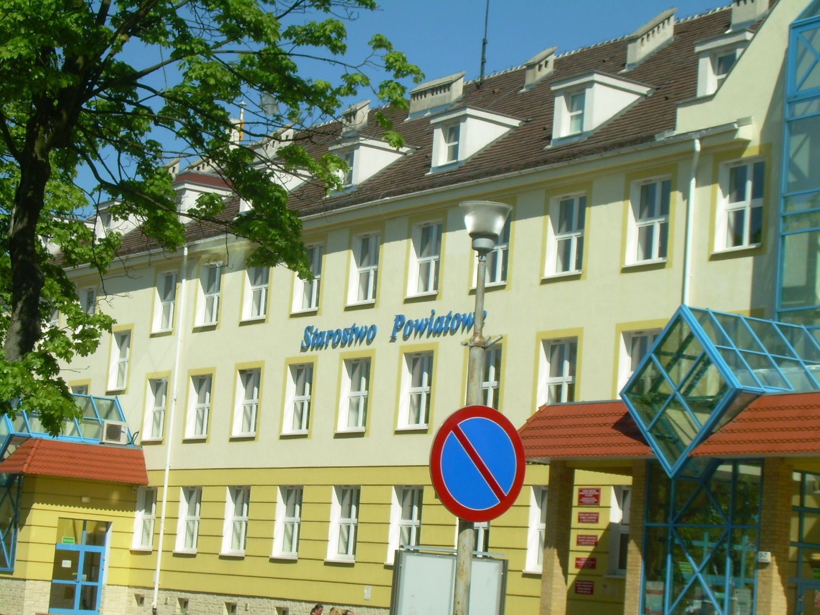 ul. Pankiewicza 5 - Budynek koszar przekształcony w starostwo powiatowe w Gorzowie Wlkp.